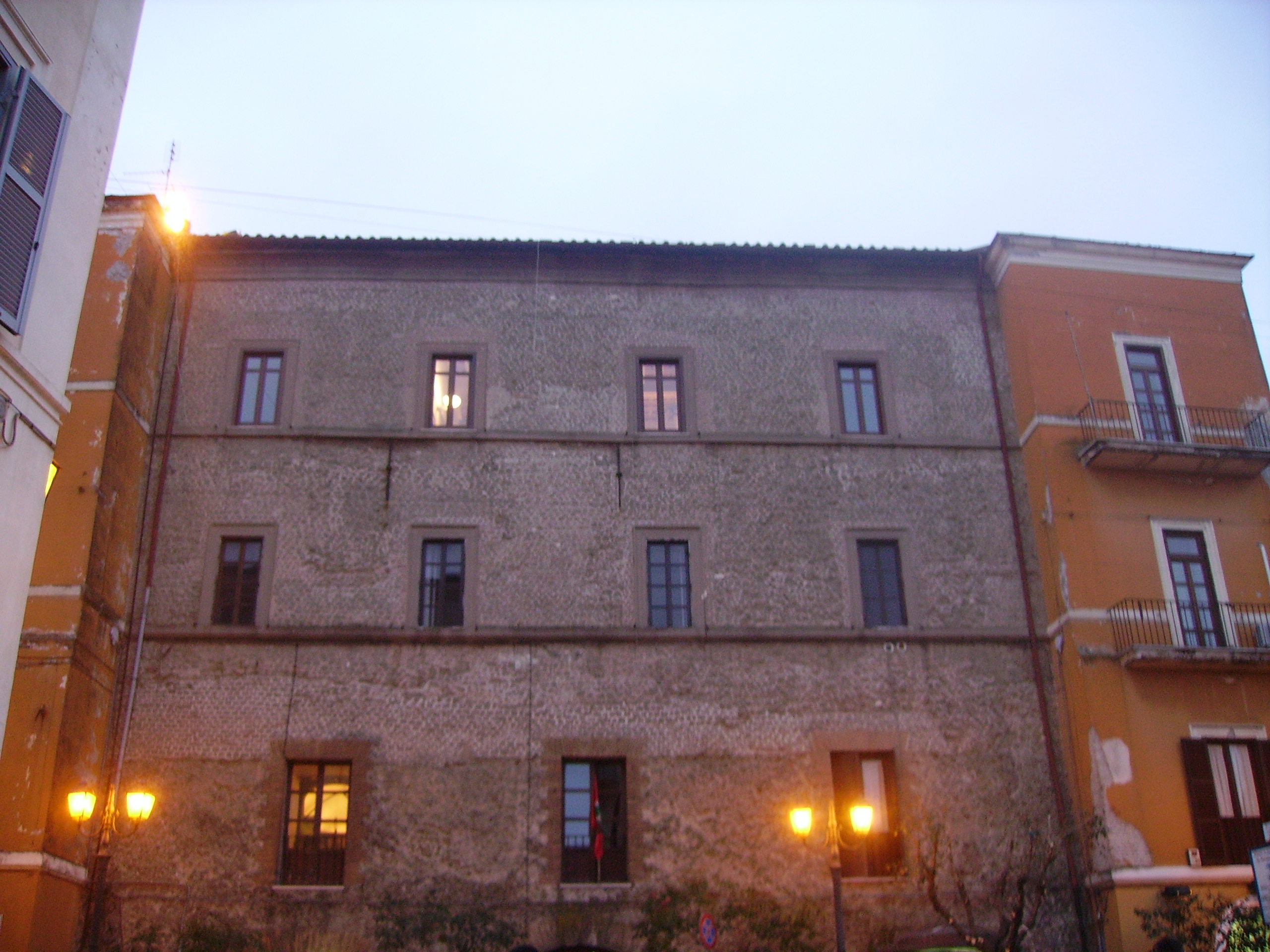 Retro Palazzo Savelli